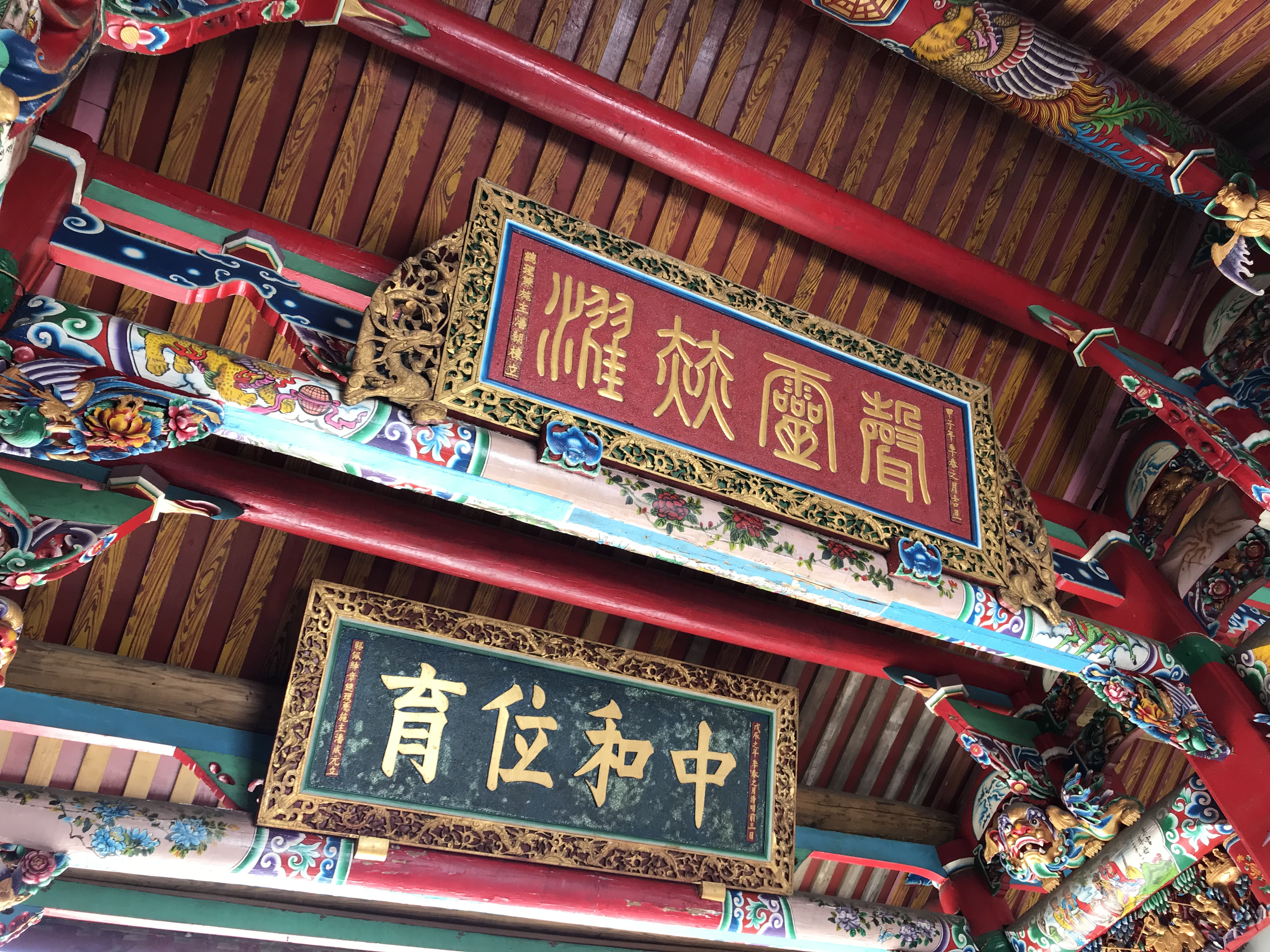 中文（台灣）: 新埔廣和宮匾額